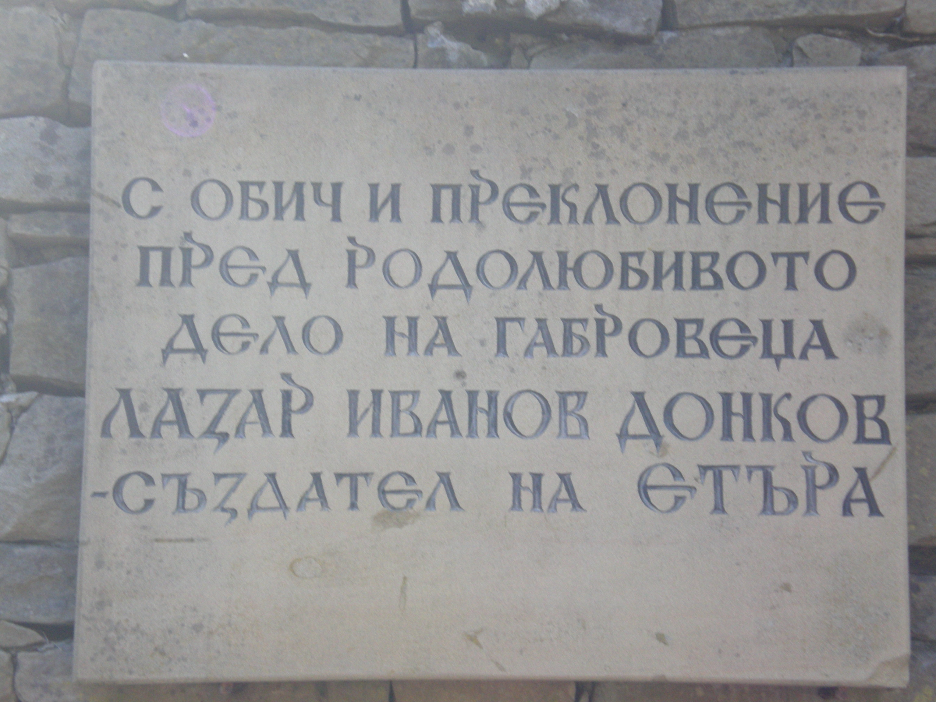 Етър